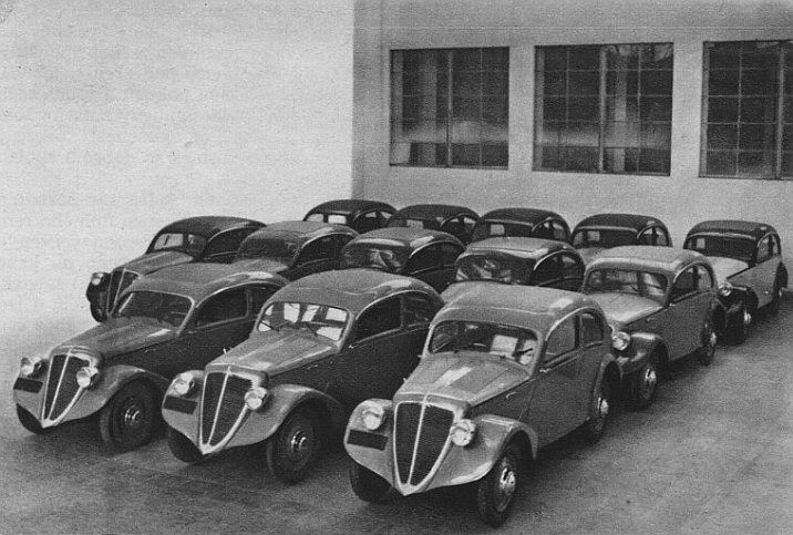 Moravská policie zakoupila 13 automobilů Z 6 (1937)